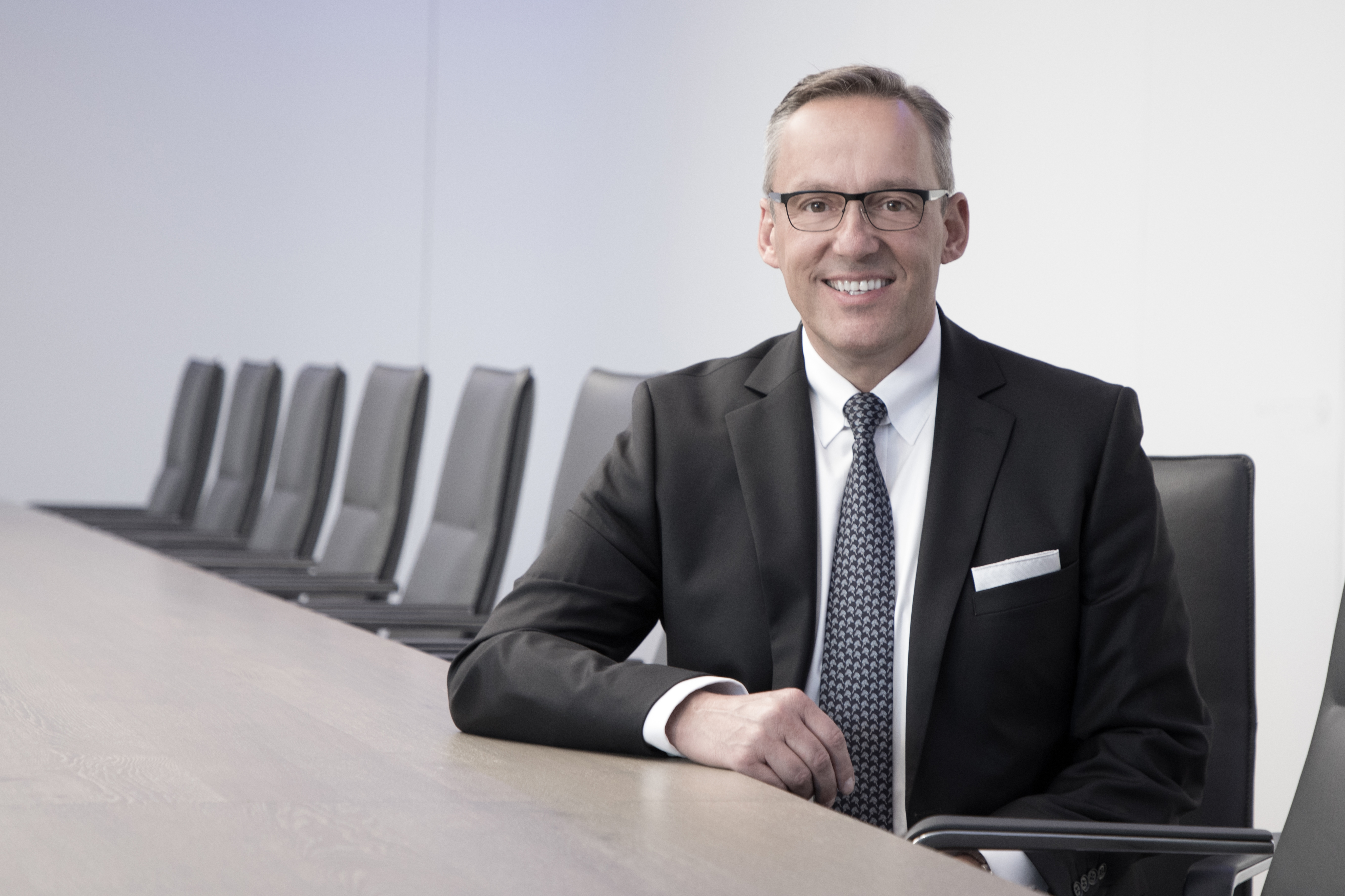 Urheberrechte: Melanie Zabel Fotografie Lizenzinahber: Volksbank Mittelhessen eG